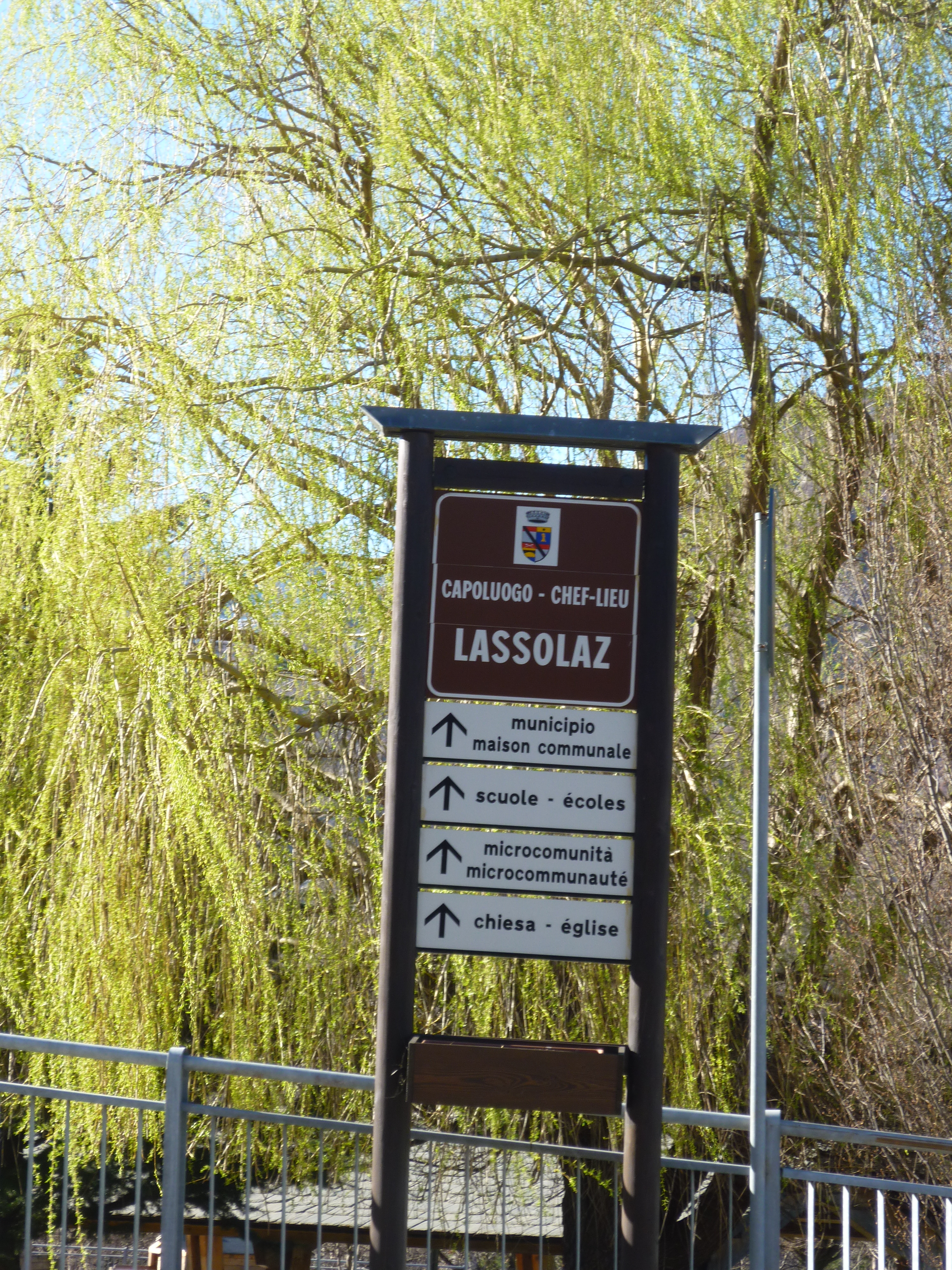 Panneau routier bilingue (français-italien) à Aoste